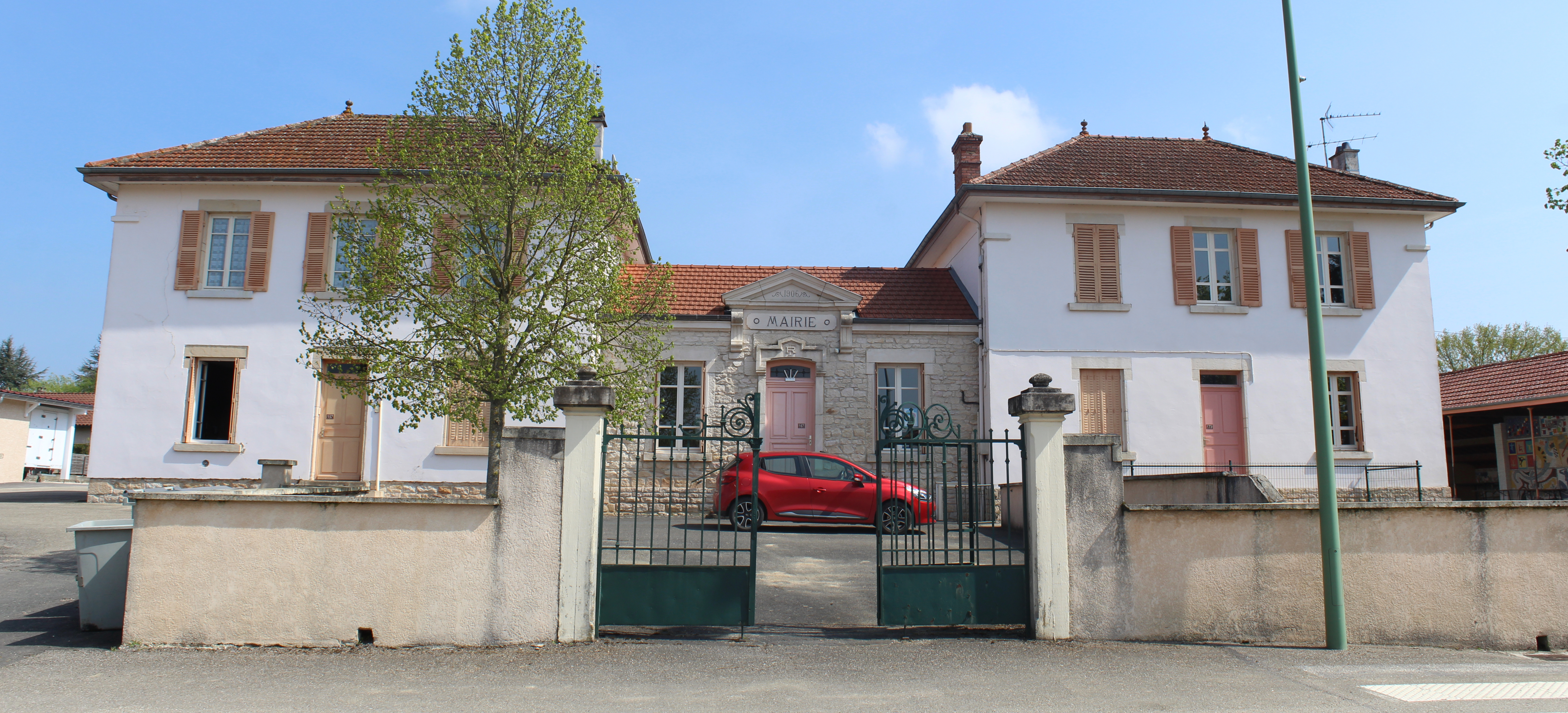 Mairie de Béréziat.